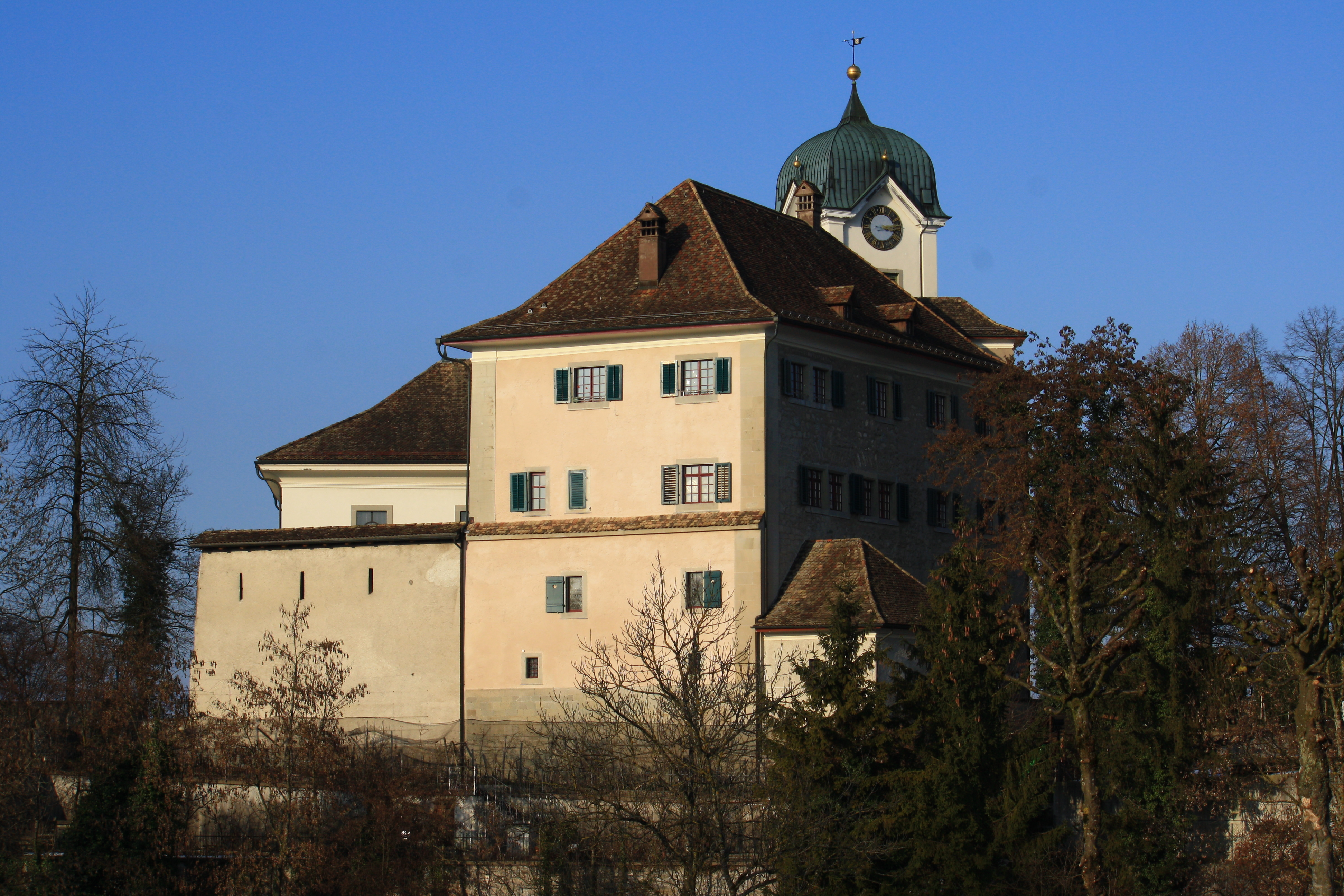 Schloss in Grüningen (Switzerland), Reformierte Kirche in the background.